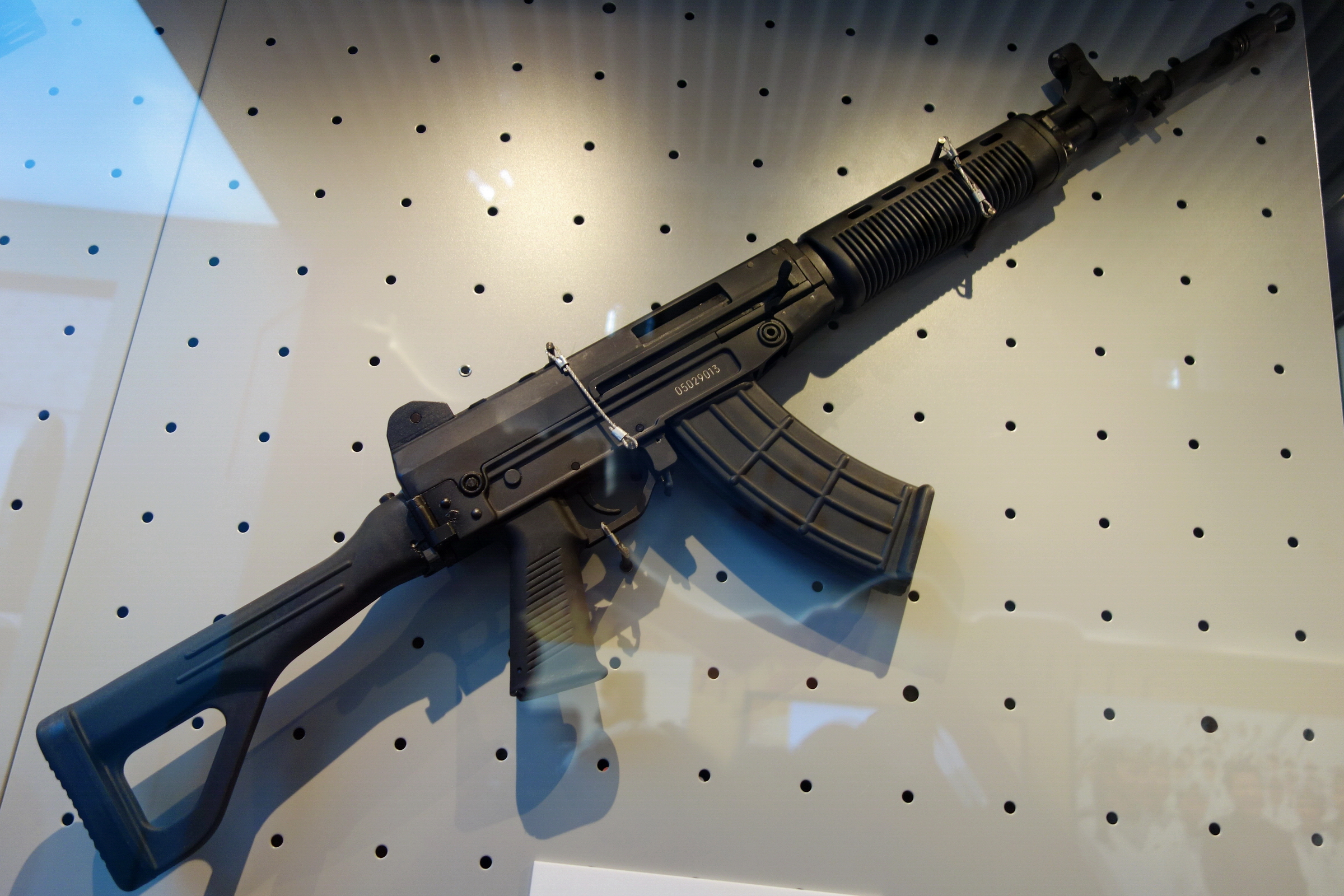 03式5.8毫米自动步枪